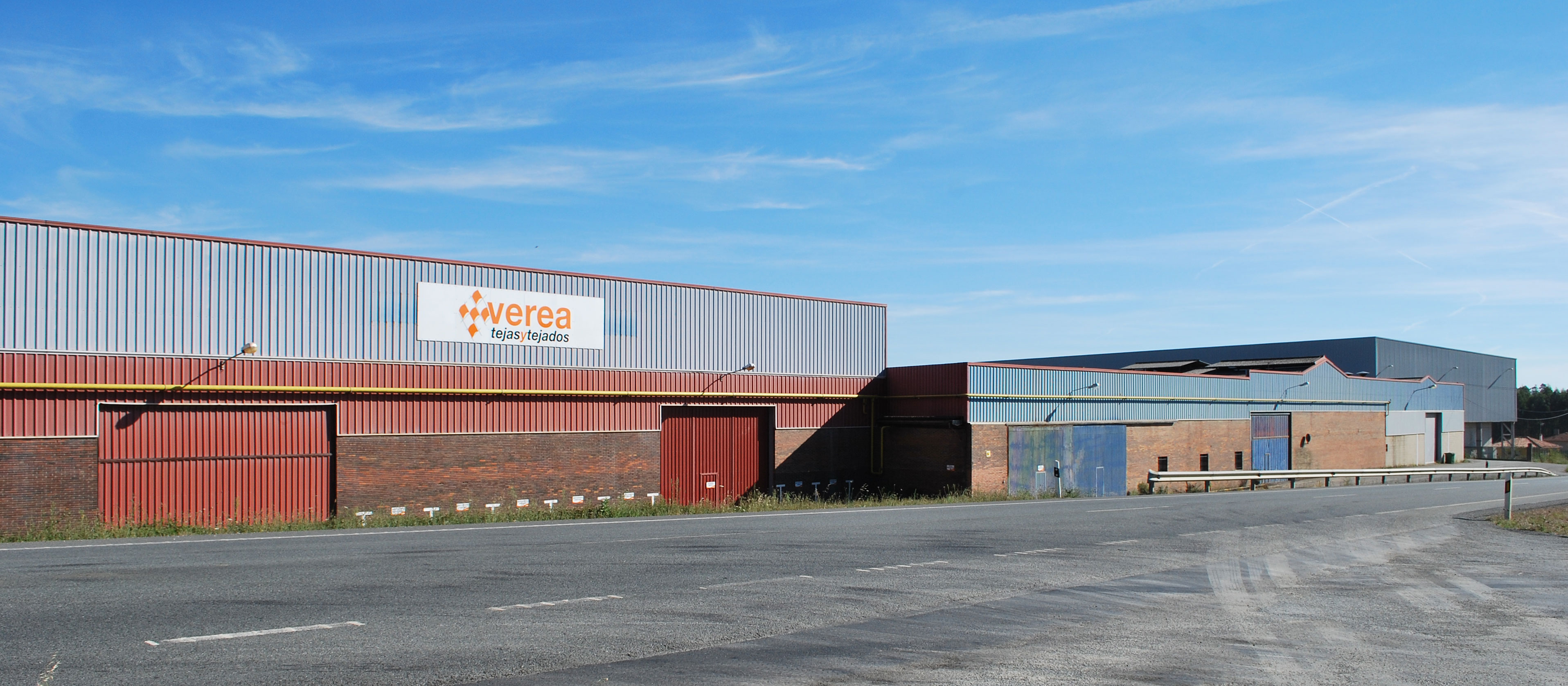 Vista da fábrica de Verea en Lanzá, Ordes A Coruña